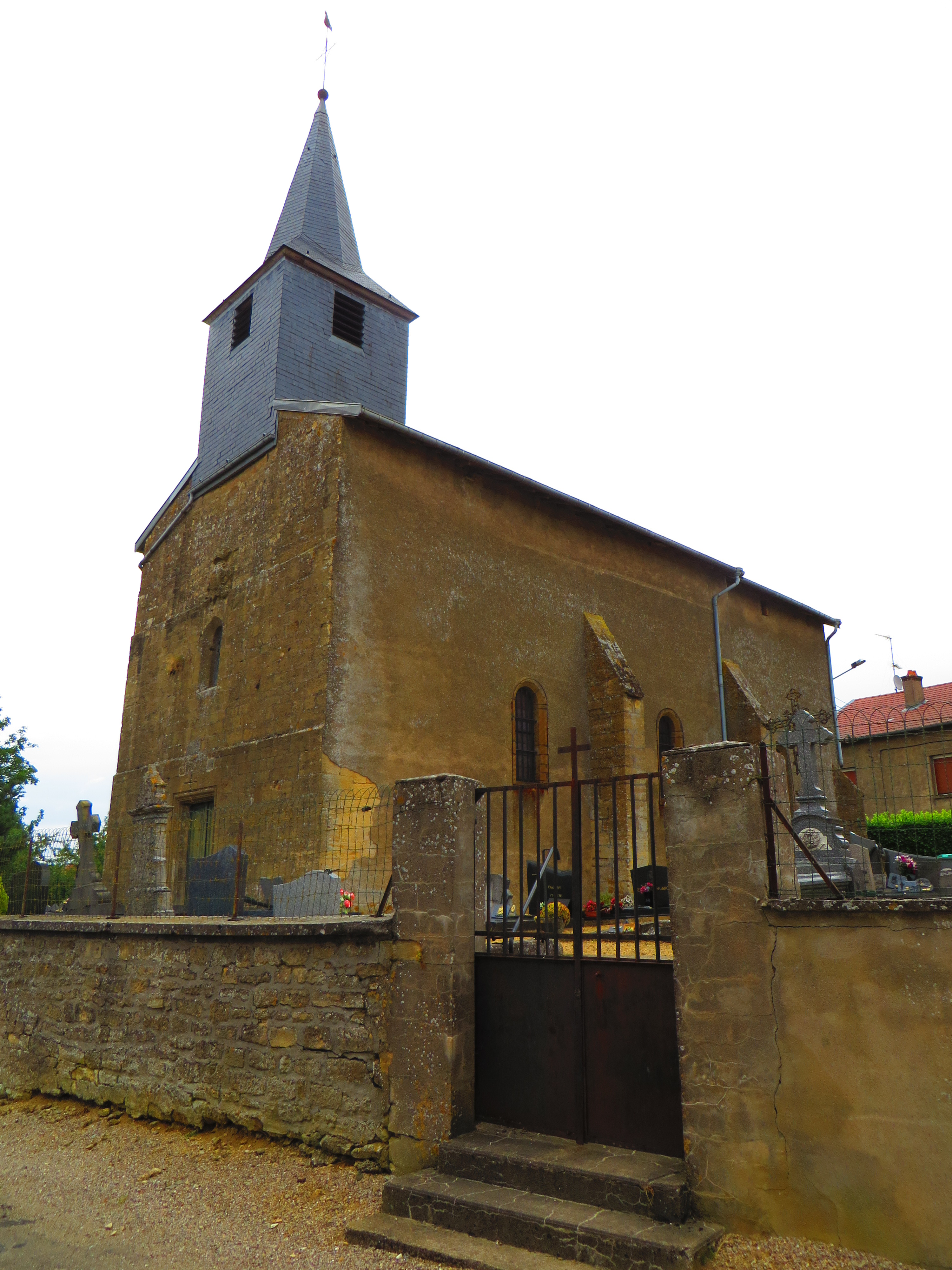 Spincourt L'église Saint-Martin de Réchicourt